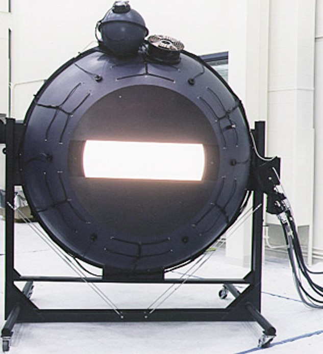 Sphère intégrante Domaine public - NASA Site